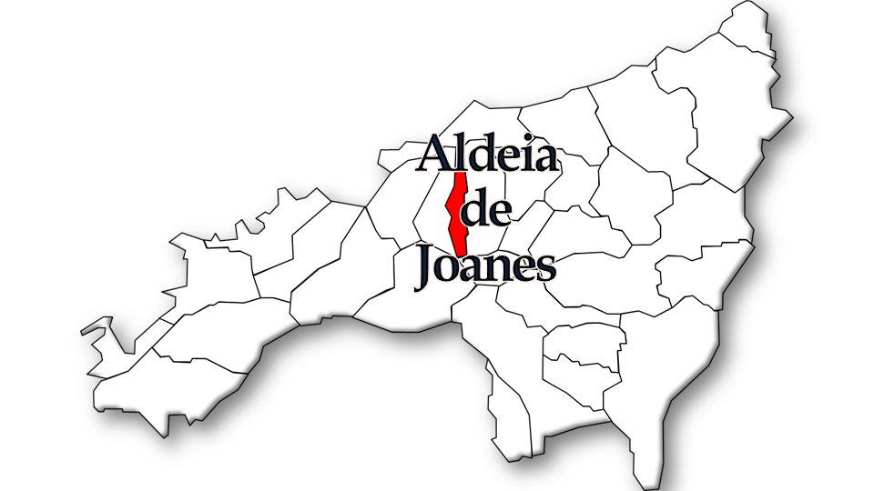 População